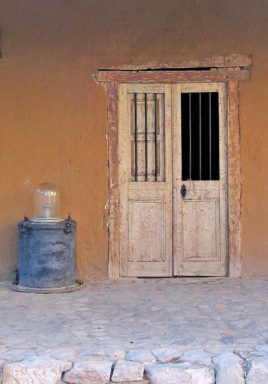 Destileria de Pisco Elqui, Chile.